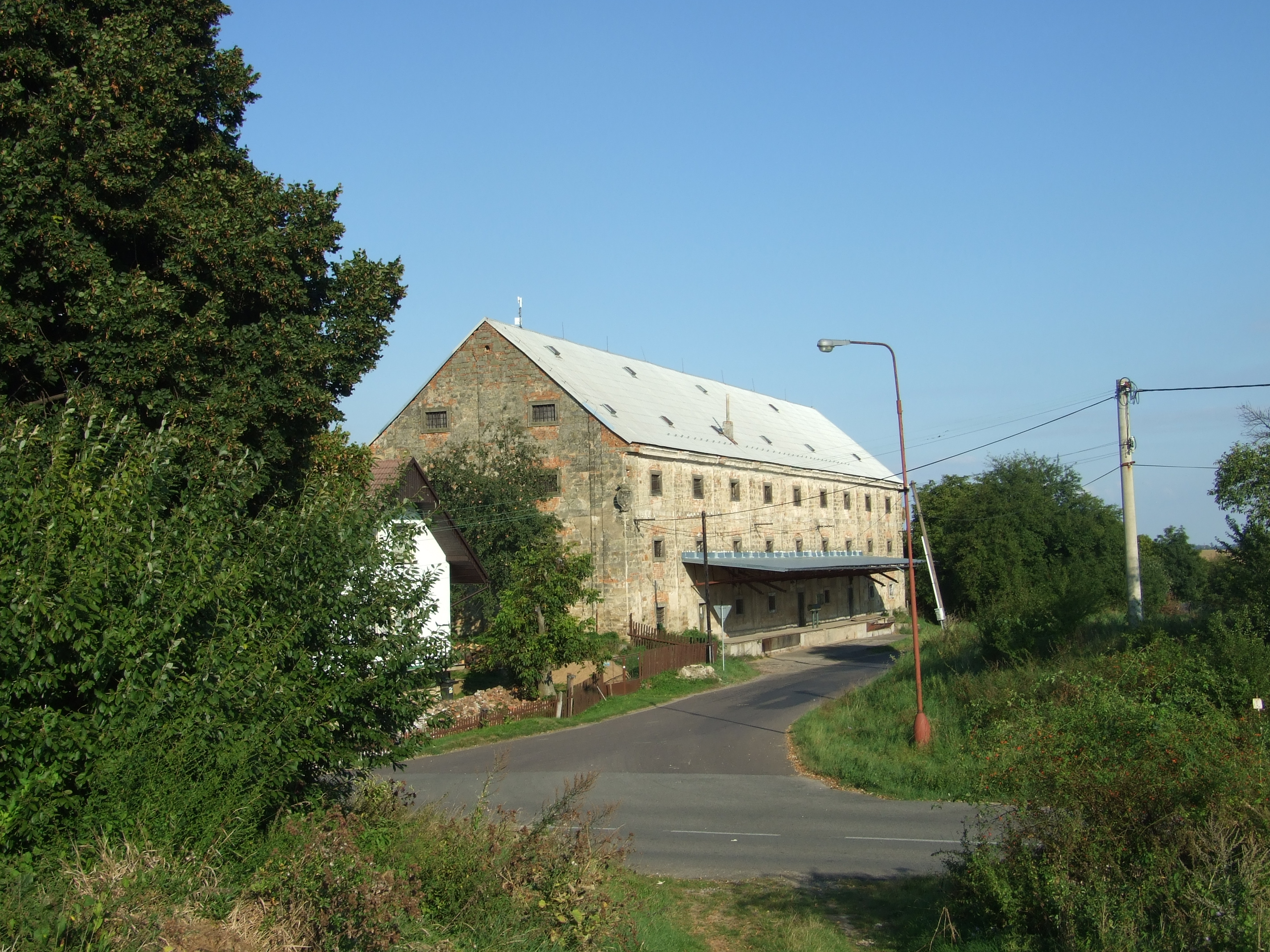 Sýpka (Střevač), JZ okraj obce, Střevač